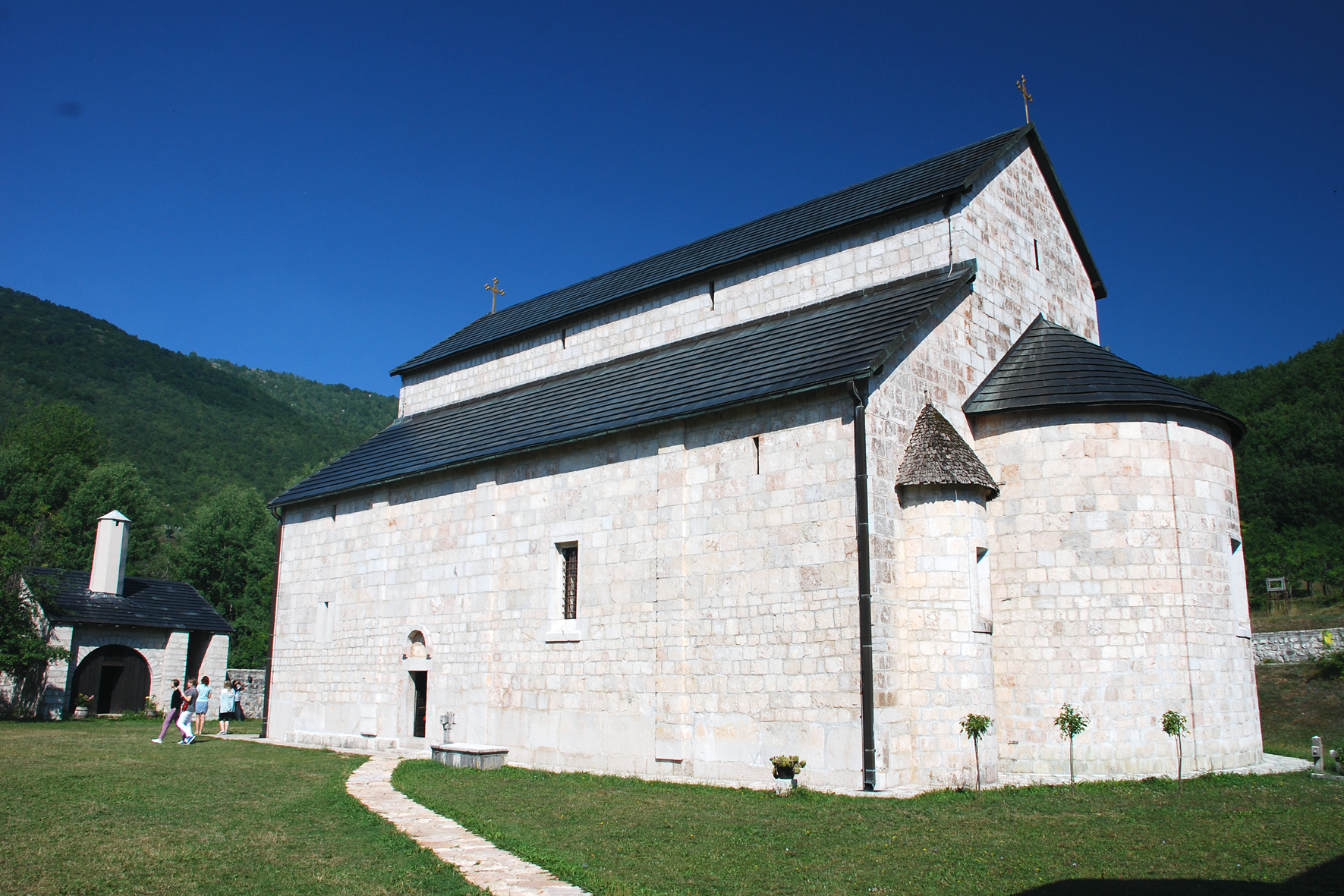 Пивский монастырь